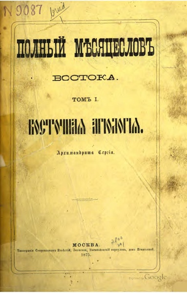 Полный месяцеслов Востока, том 1, Восточная агиология, архимандрита Сергия, 1875 год. титульный лист.